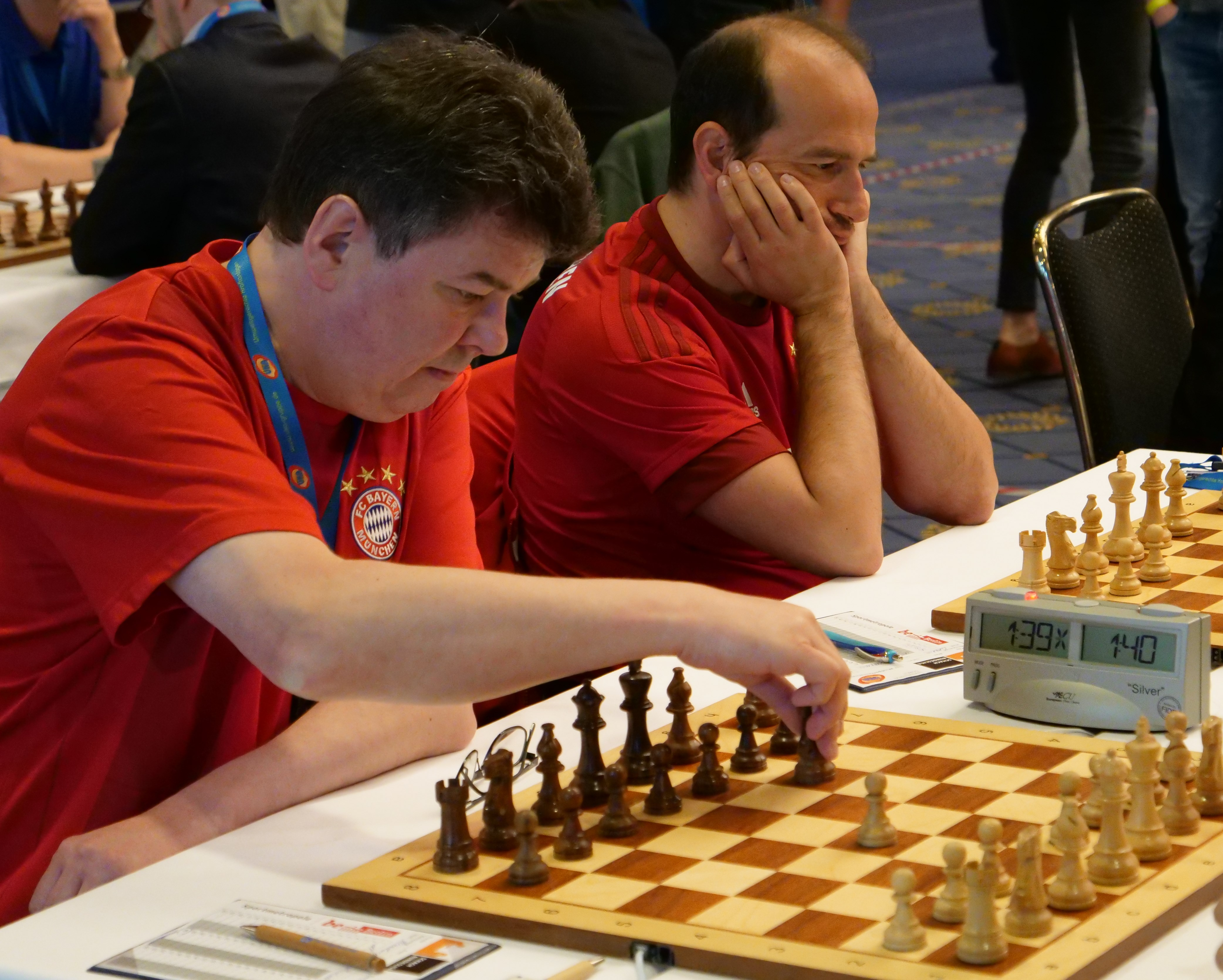 Klaus Bischoff und Christian Gabriel Bundesliga-Finalrunde 30-4-2018